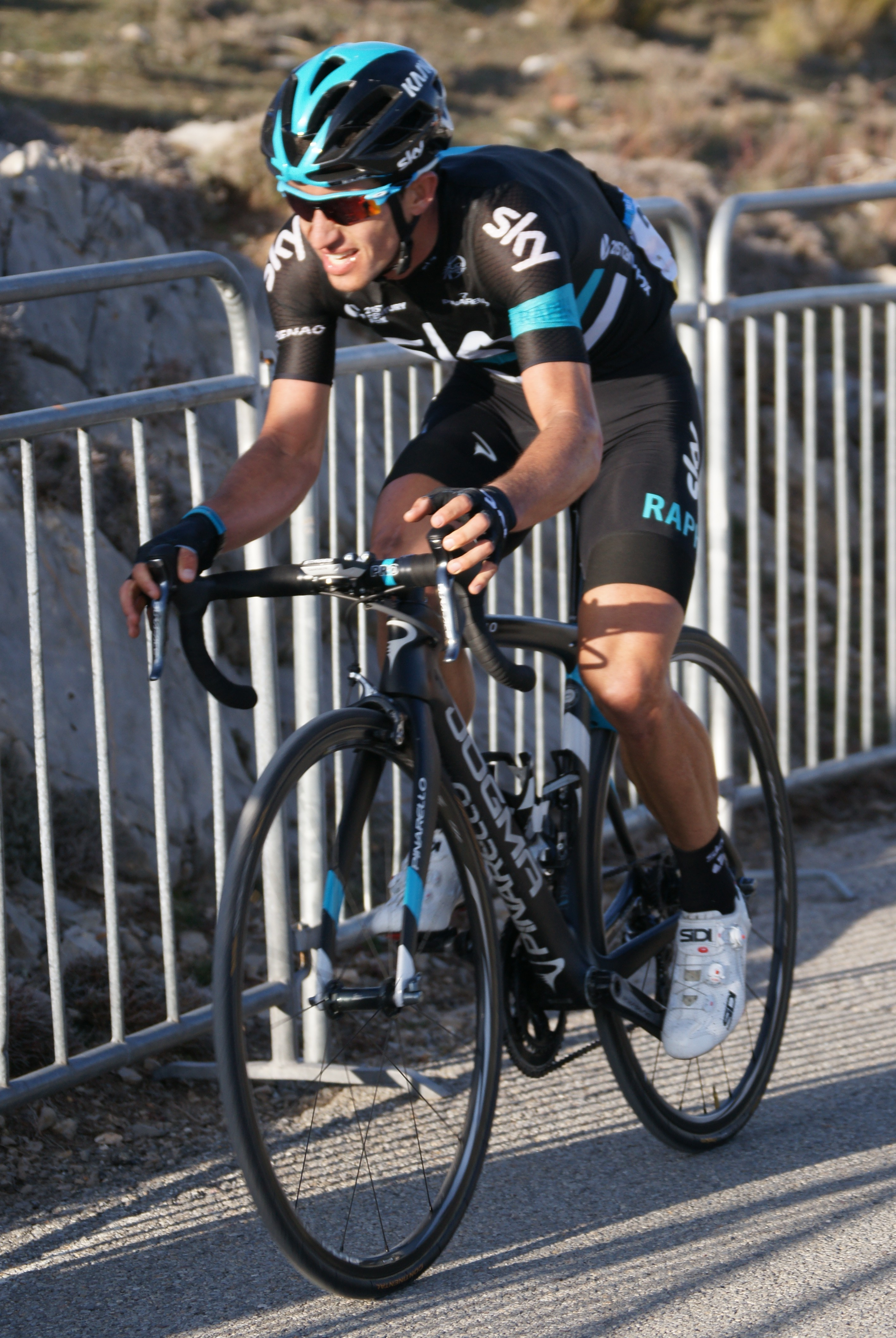 Sergio Henao Madone d'Utelle 2016 Depicted person: Sergio Henao Depicted team: Sky